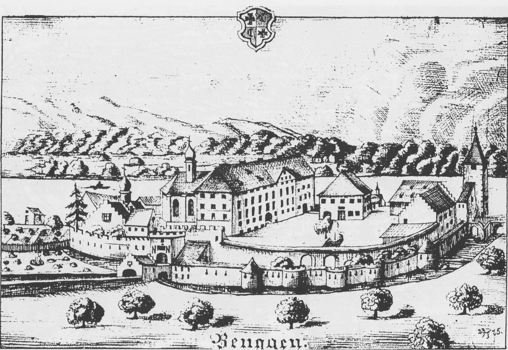 Schloss Beuggen: Vedute aus dem Jahr 1775 mit dem Wappen des Landkomturs Beat Konrad Philipp Reuttner von Weil der Ballei Elsass und Burgund